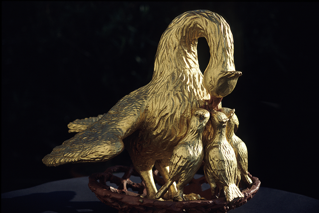 Innenraum der Ev. Kirche Atzbach, Lahnau, Lahn-Dill-Kreis, Hessen, Deutschland